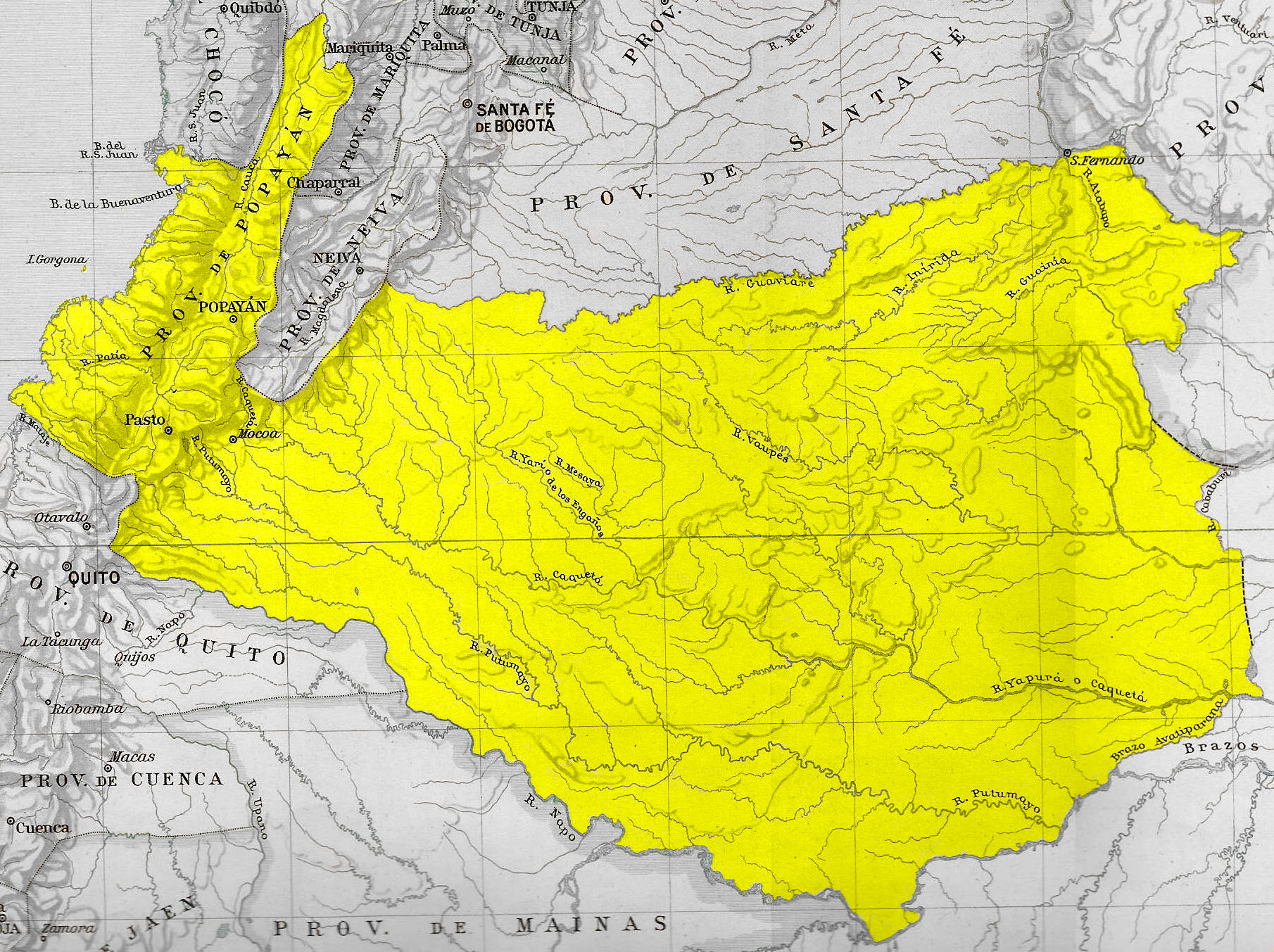 Mapa de la Provincia de Popayán en 1810 y 1830